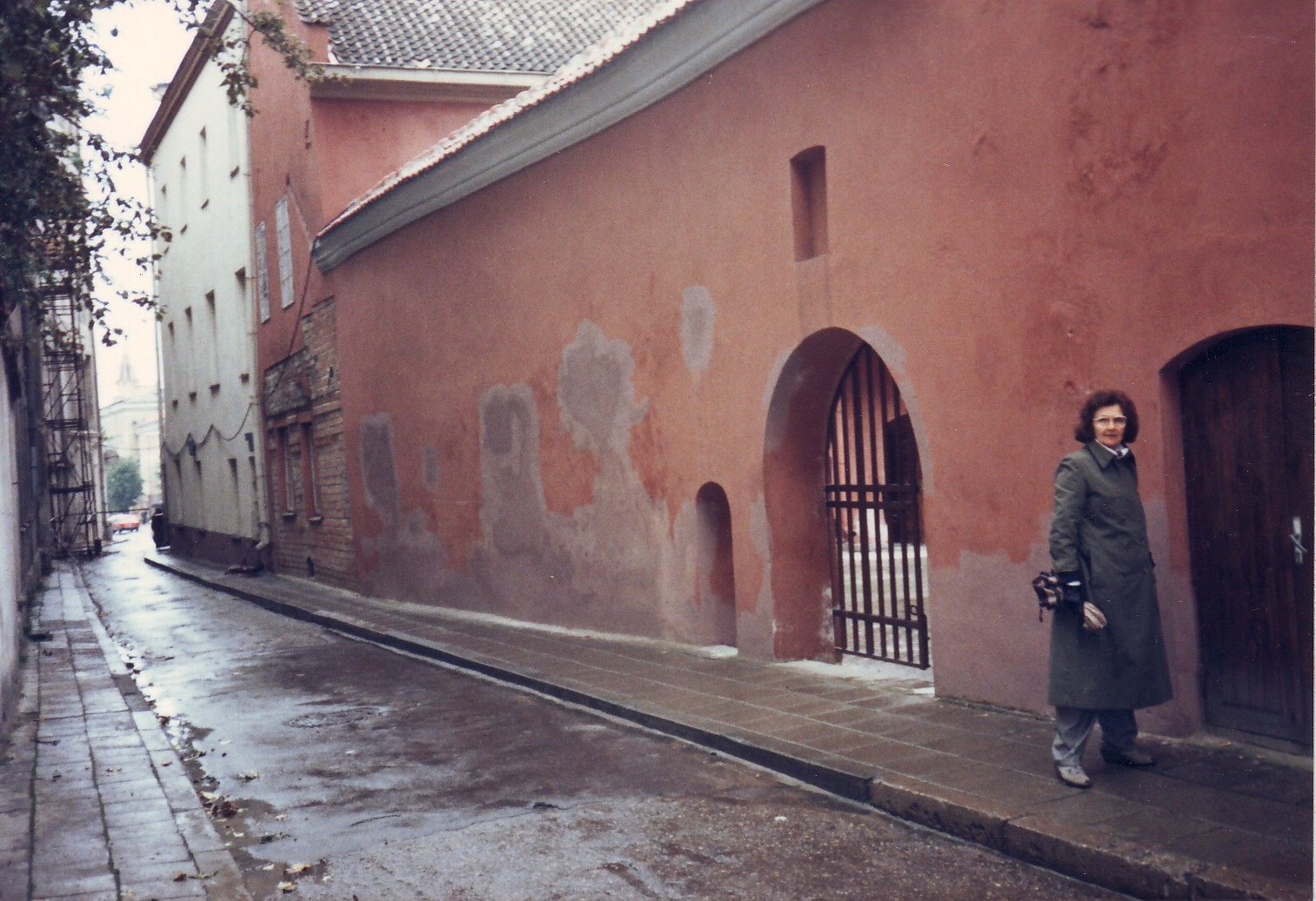 סמטת קונסקה